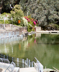 Taufanlage im christlichen Pilgerort Jardenit am See Genezareth in Israel. Fotografiert von Benutzer:datafox Ausdrücklich als GNU freigegeben. bei Fragen